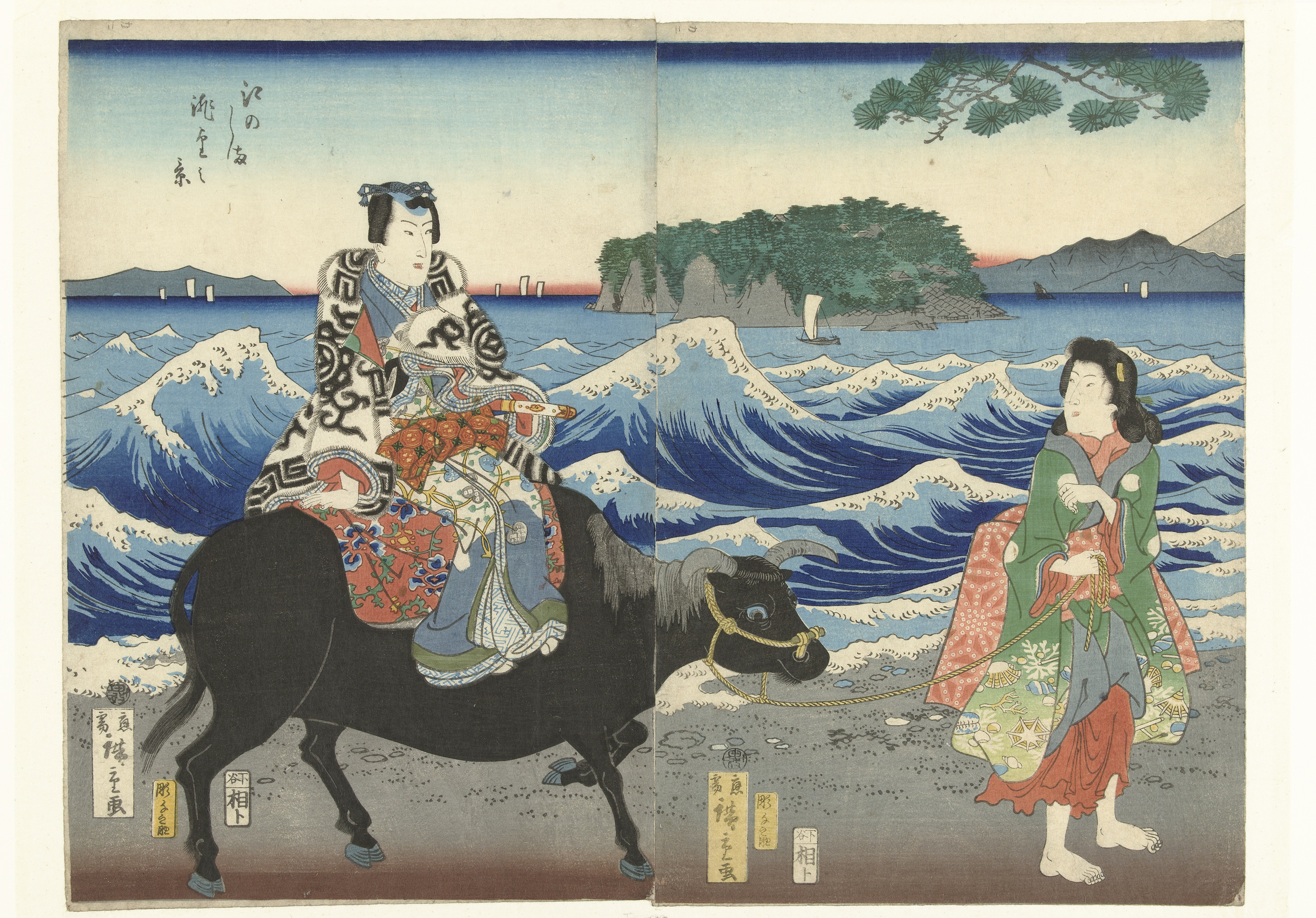 Diptiek: Elegant geklede man zittend op zwarte os, kijkend naar op blote voeten lopende vrouw in kimono met patroon van schelpen; op strand bij woeste branding; het eiland Enoshima op de achtergrond. Label Line: mentioned on object Hiroshige (II) , Utagawa (1826 - 1869), 1860, kleurenhoutsnede; lijnblok in zwart met kleurblokken Collection: prenten; Japan (collectie)